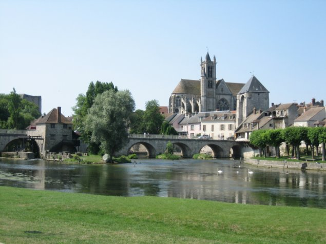 Description : Moret sur Loing, vue du pont, de l'église et de la Porte de Bourgogne, 16 juillet 2005 Source : Alexh Licence : GFDL Alexh